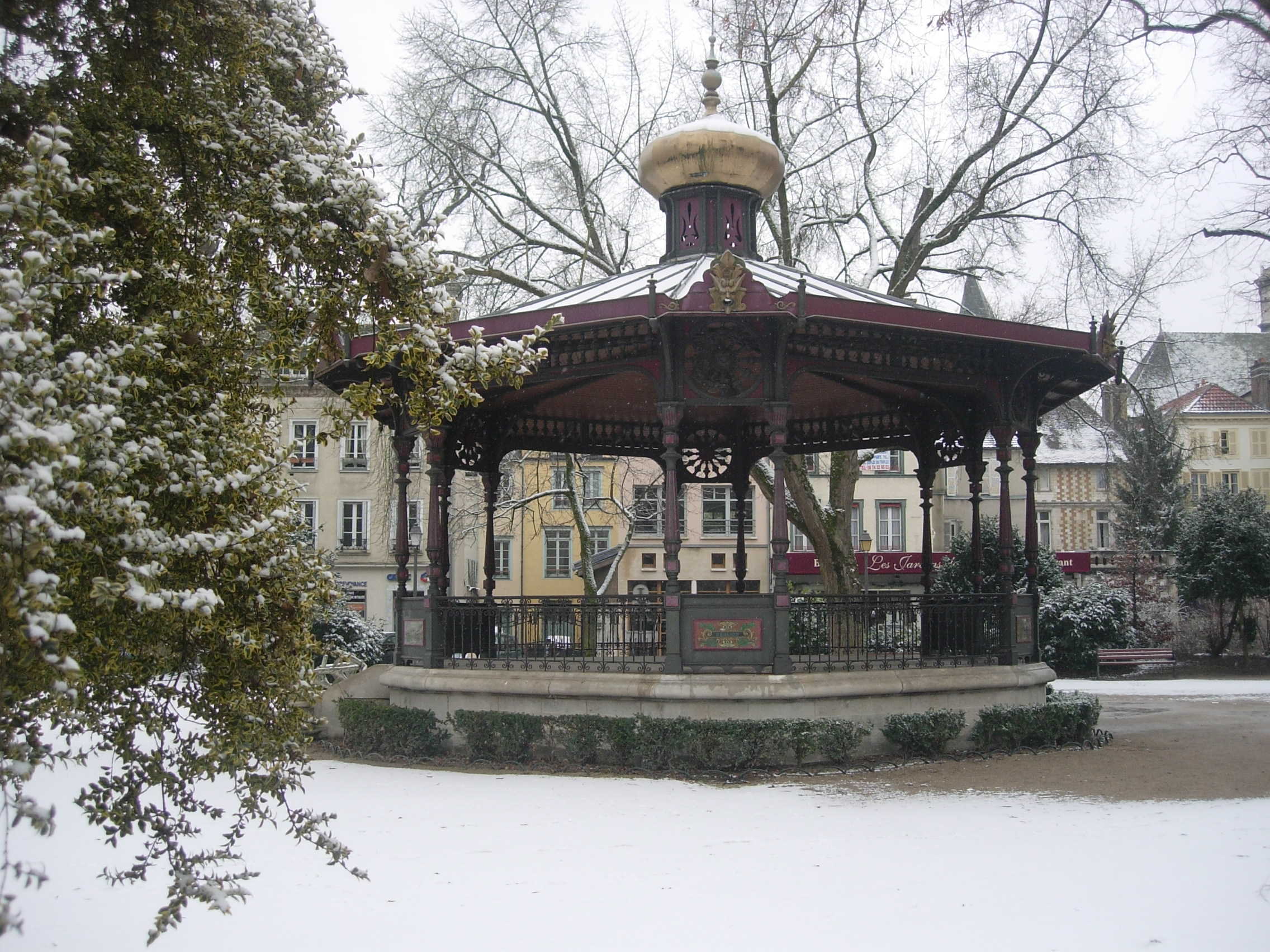 Troyes: kiosque à musique - monument classé